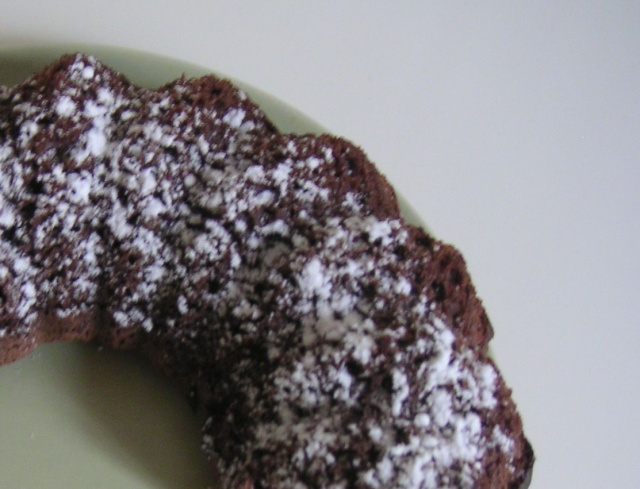 Pa de pessic de xocolata, és igual que el pa de pessic tradicional però s'hi substitueix una part de la farina per cacao en pols o, de vegades, xocolata en pols.